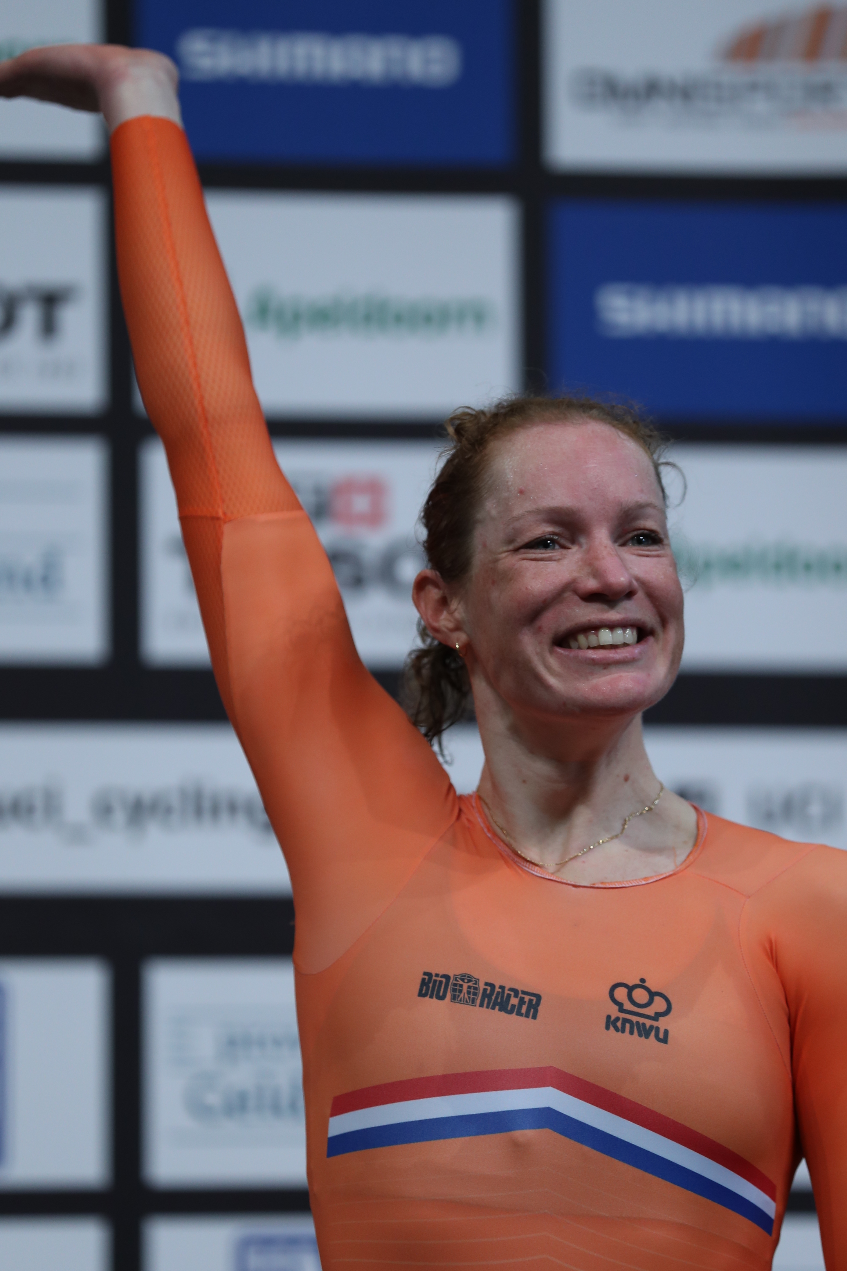 Kirsten Wild, niederländische Radsportlerin